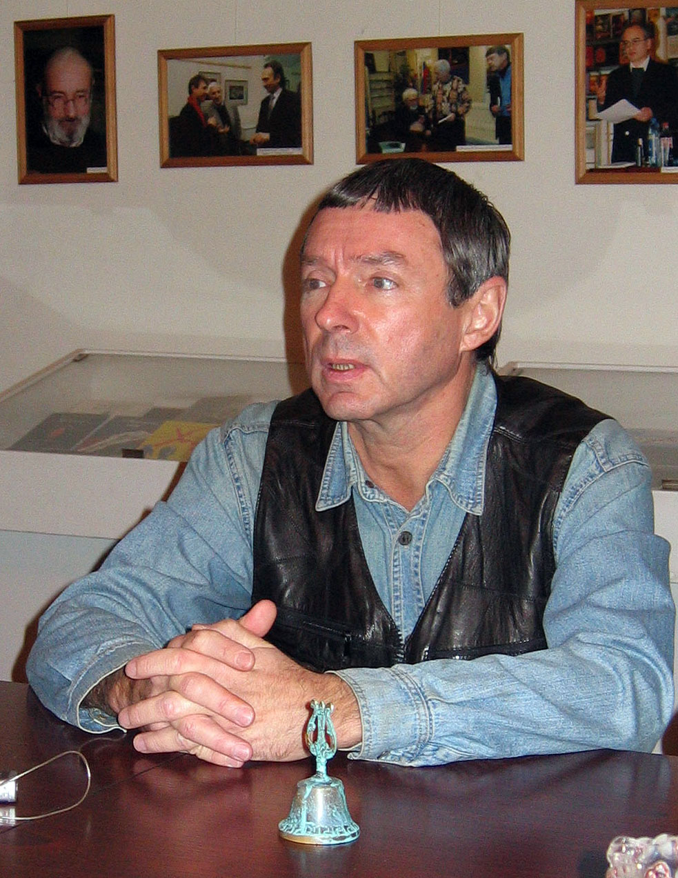 Vyacheslav Rybakov